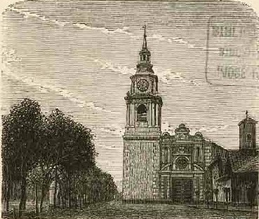 Santiago - Iglesia de San Francisco (1872).